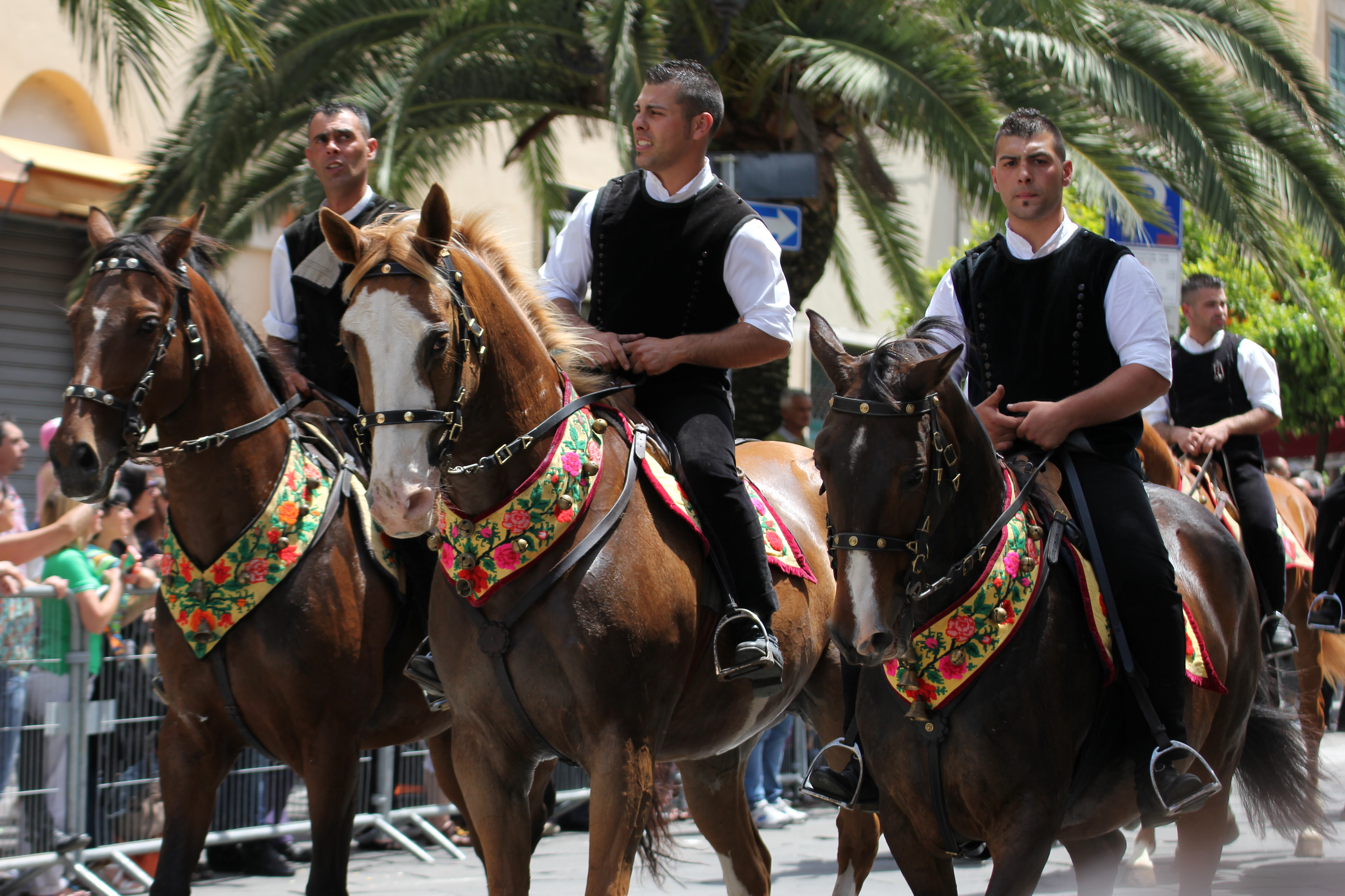 Costume tradizionale durante la "Cavalcata sarda a Sassari